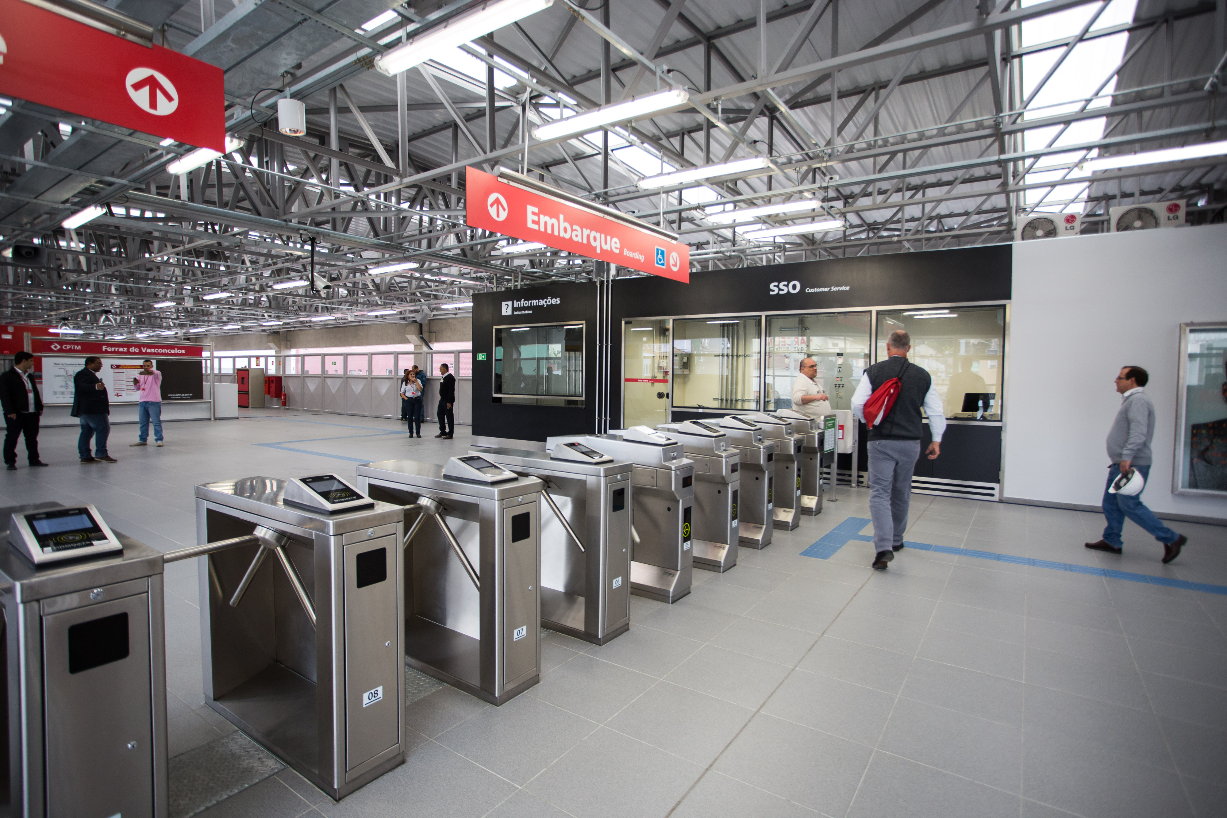 O Governador de São Paulo entrega estação da CPTM em Ferraz de Vasconcelos e também anunciou a liberação do FUMEFI para obras de infraestrutura do Programa de Mobilidade Municipal. Data: 26/08/2015. Local: Ferraz de Vasconcelos/SP.Foto: Eduardo Saraiva/A2img